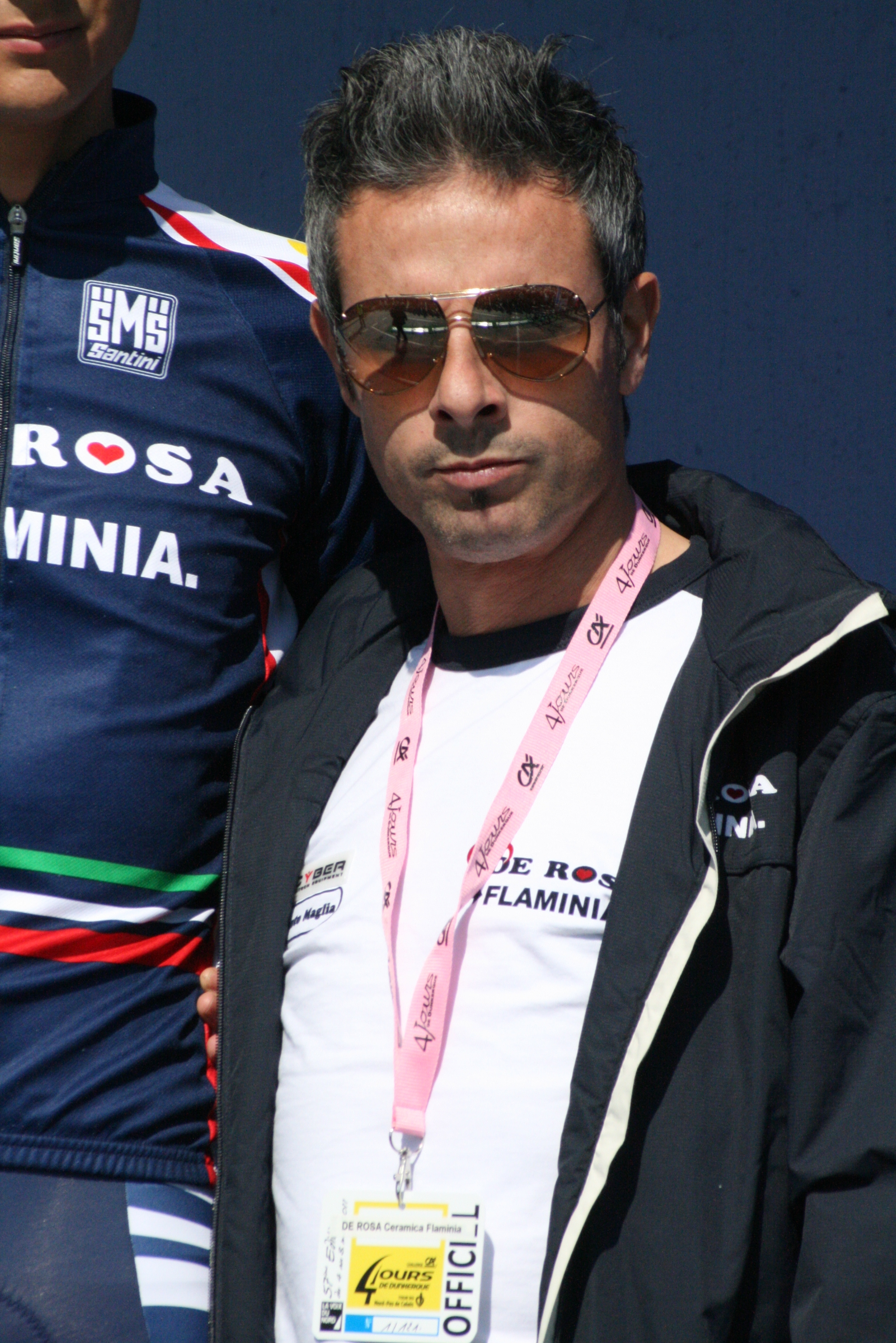 Présentation des coureurs au départ de la première étape Gabriele Missaglia